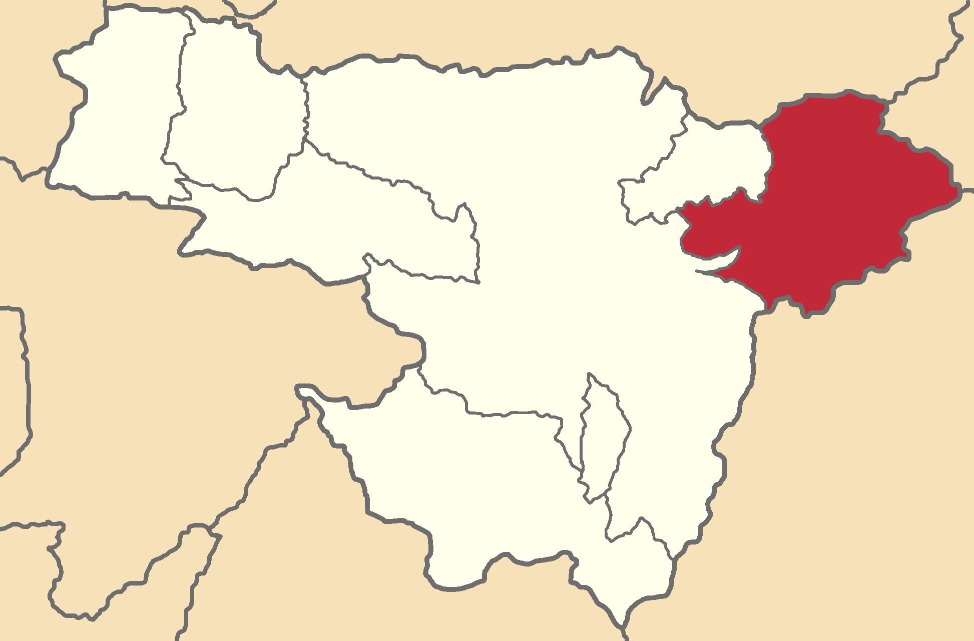 Mapa localizador del cantón en Pichincha, Ecuador